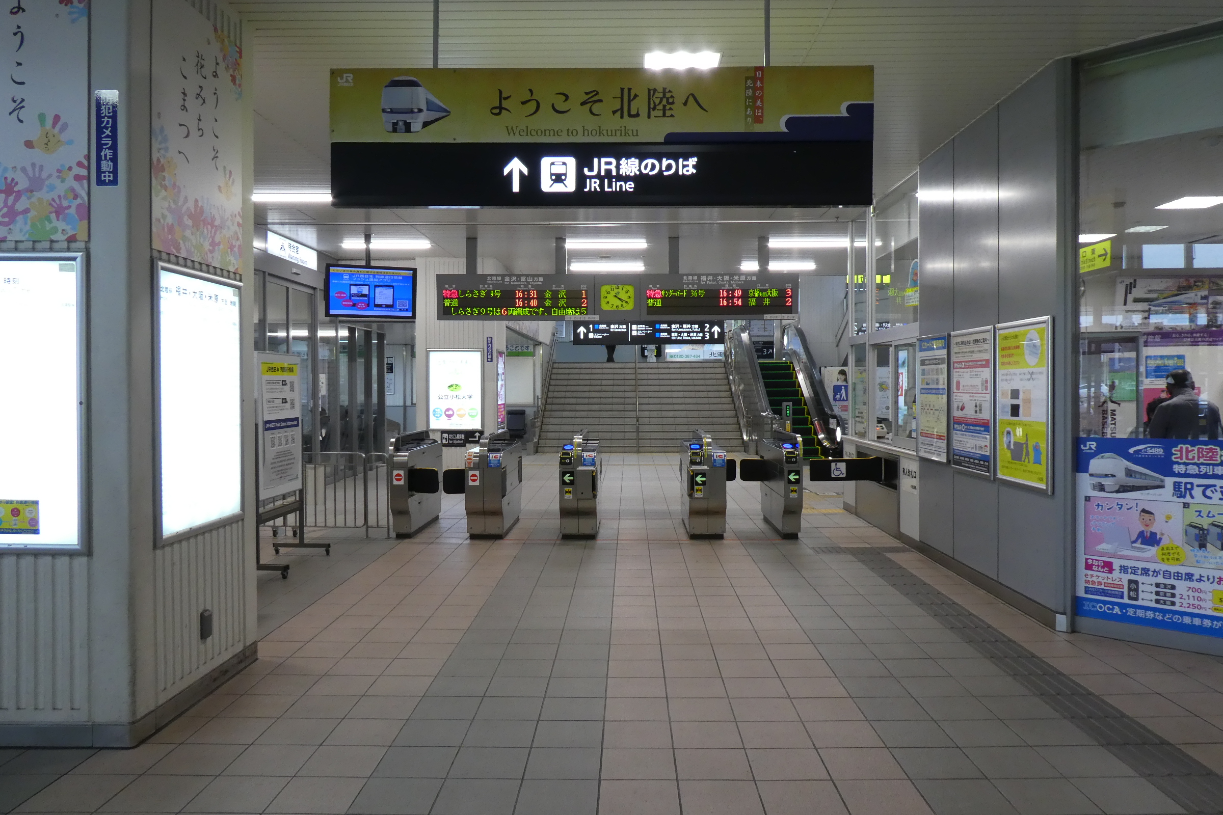 JR北陸本線、小松駅改札。